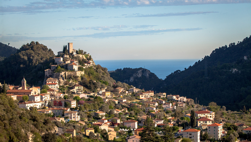 Vue générale